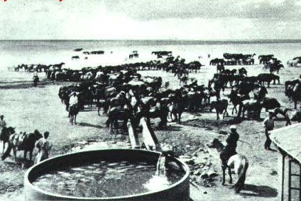 1965-01 锡林郭勒盟草原